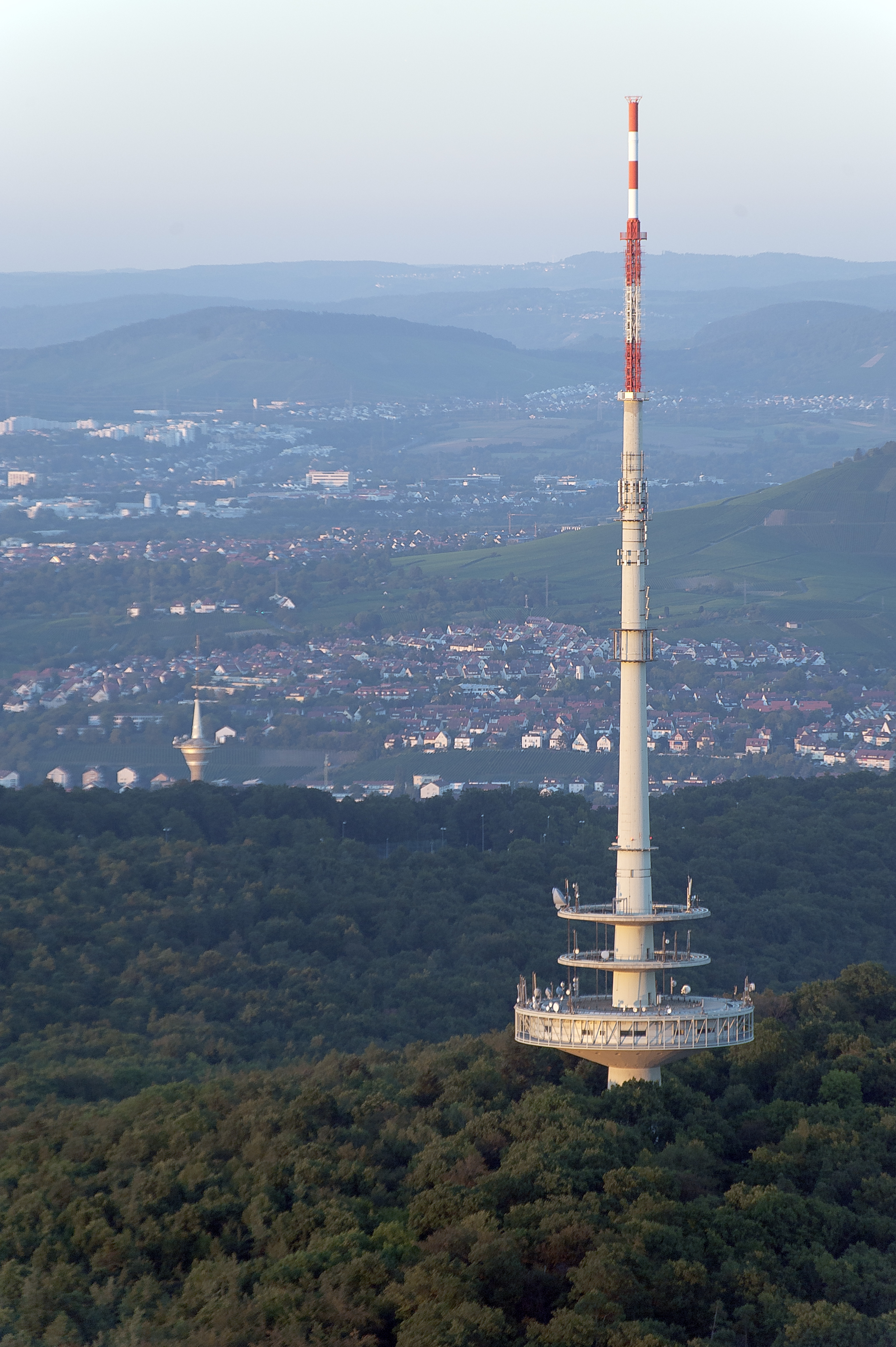 Fernmeldeturm Stuttgart, vom Fernsehturm aus aufgenommen